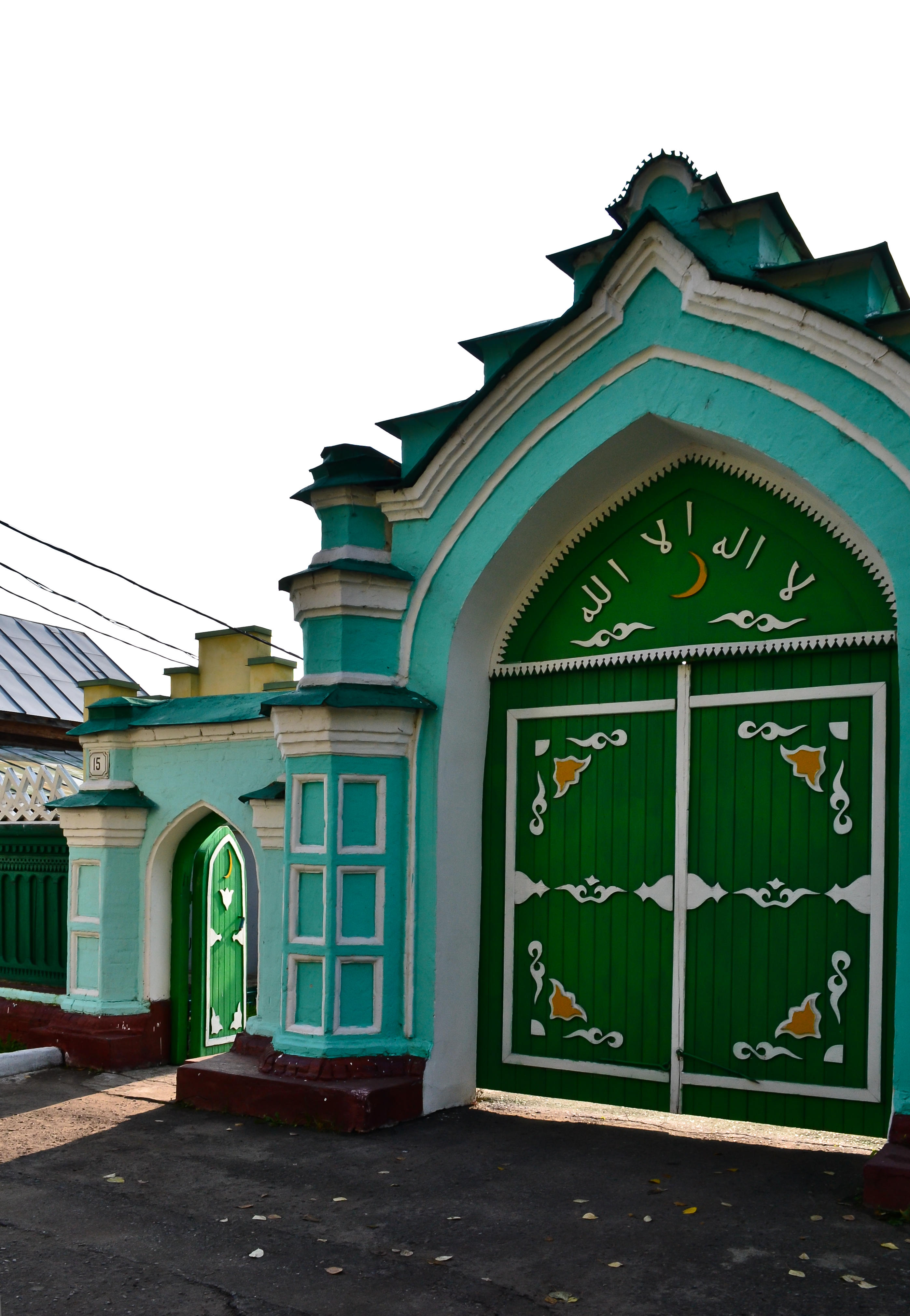 изящная старокаменная мечеть города, украшение Старо-Татарской слободы